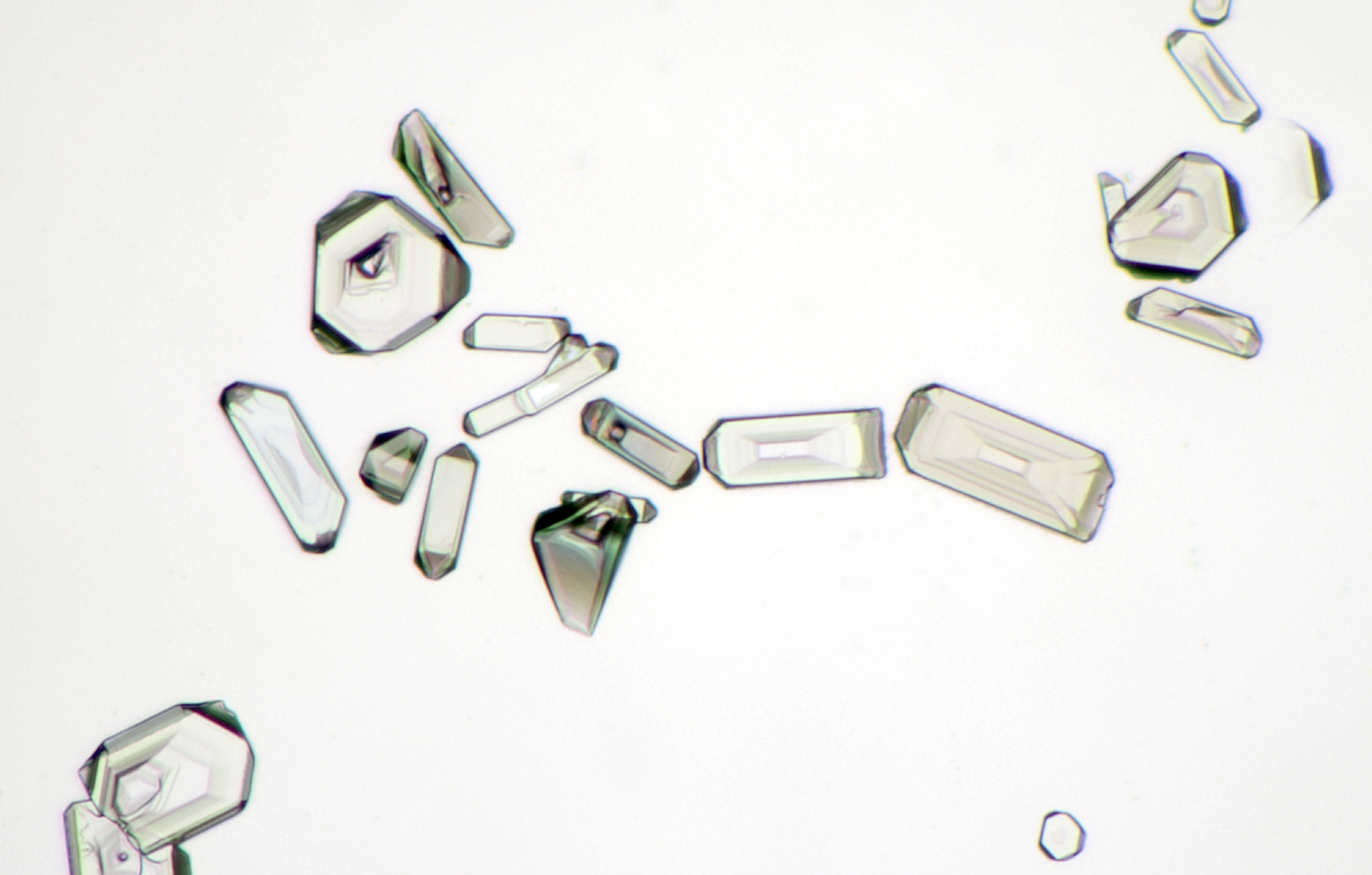 Ammoniumdihydrogenphosphat